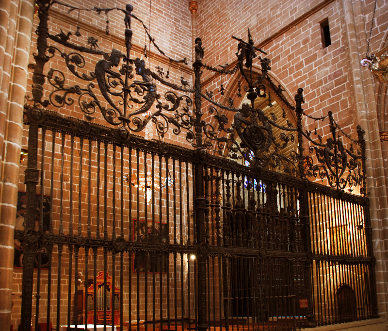 reja renacentista pamplona